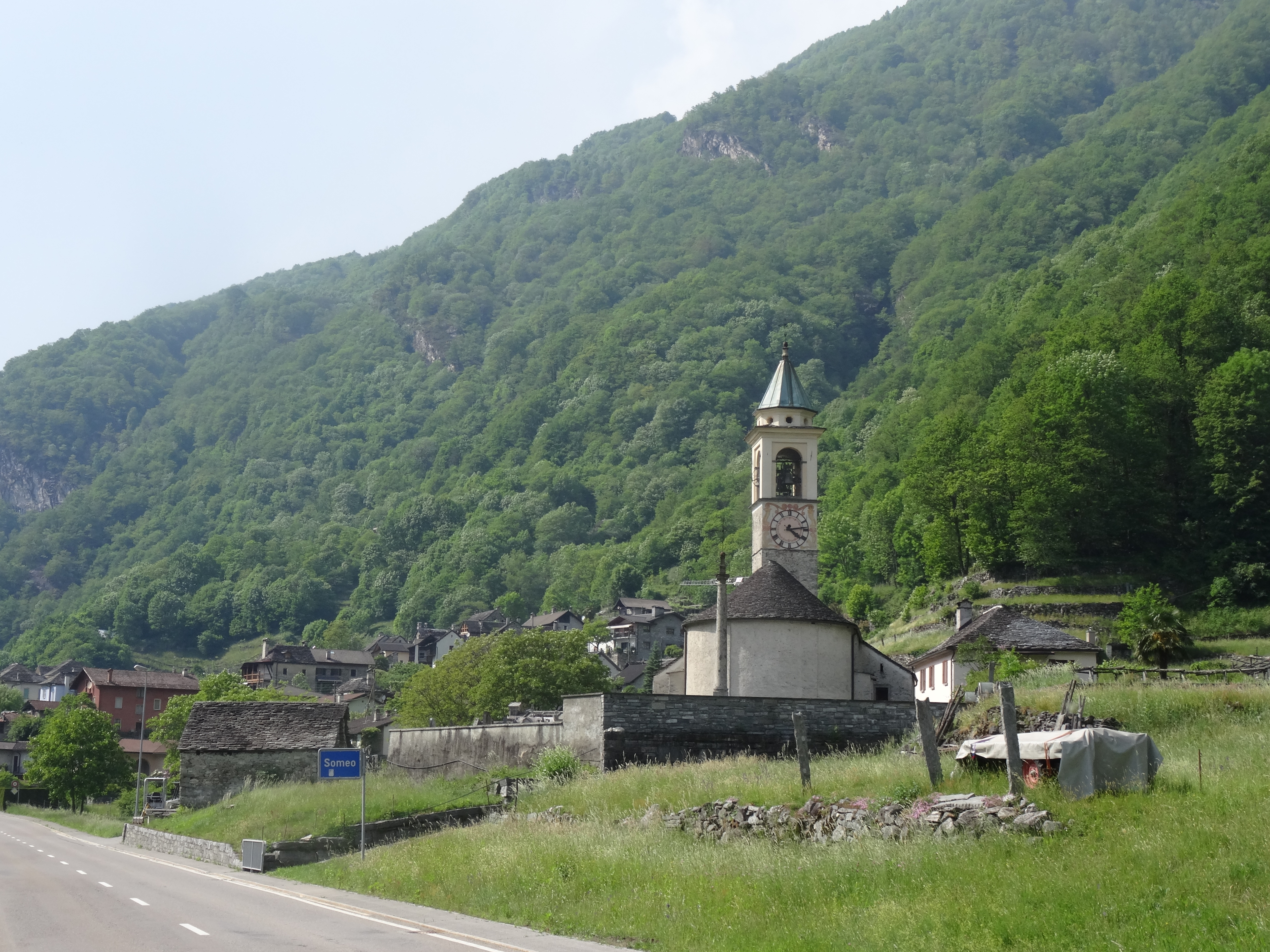 Someo